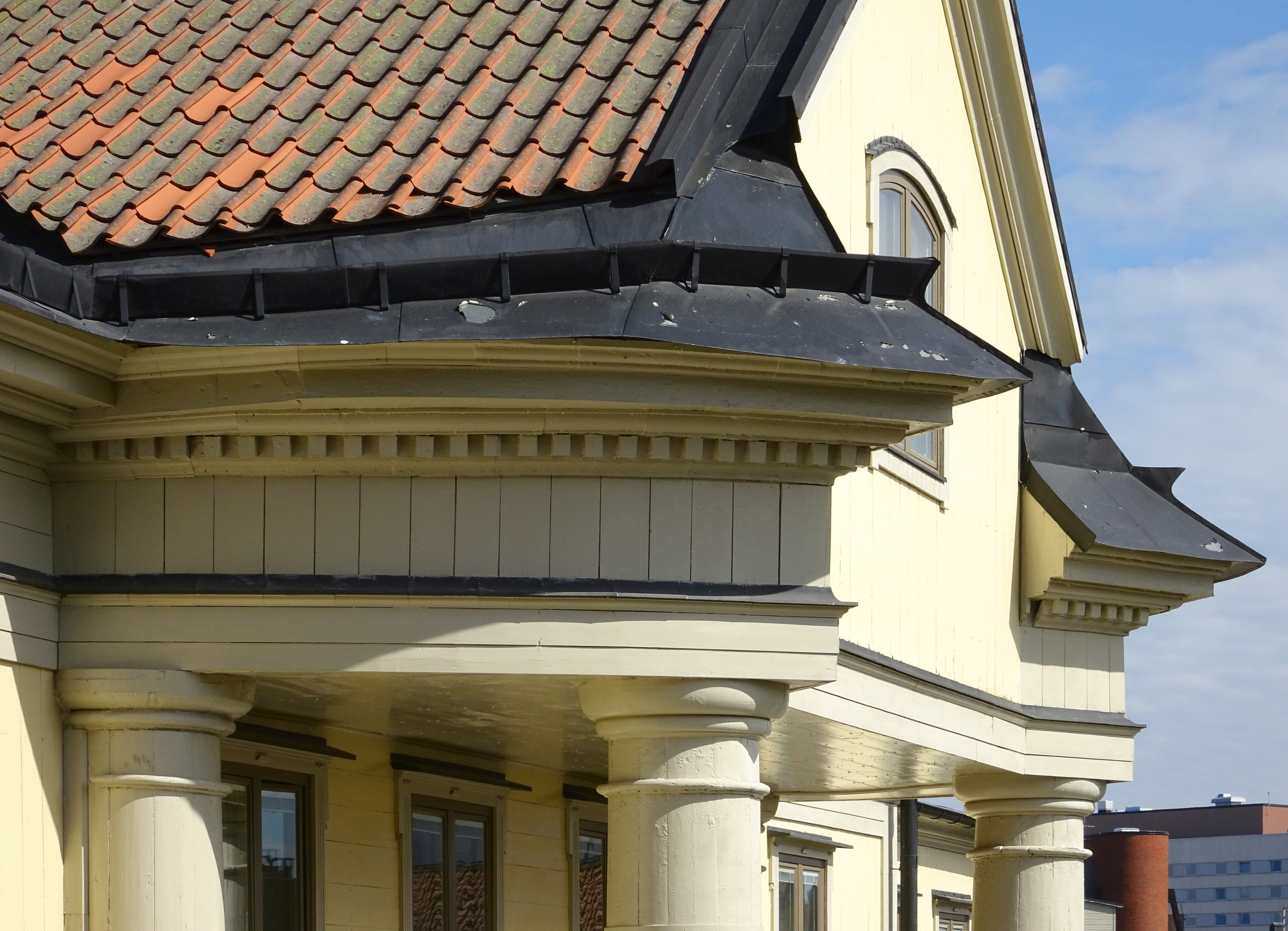 Mariehälls gård huvudbyggnad